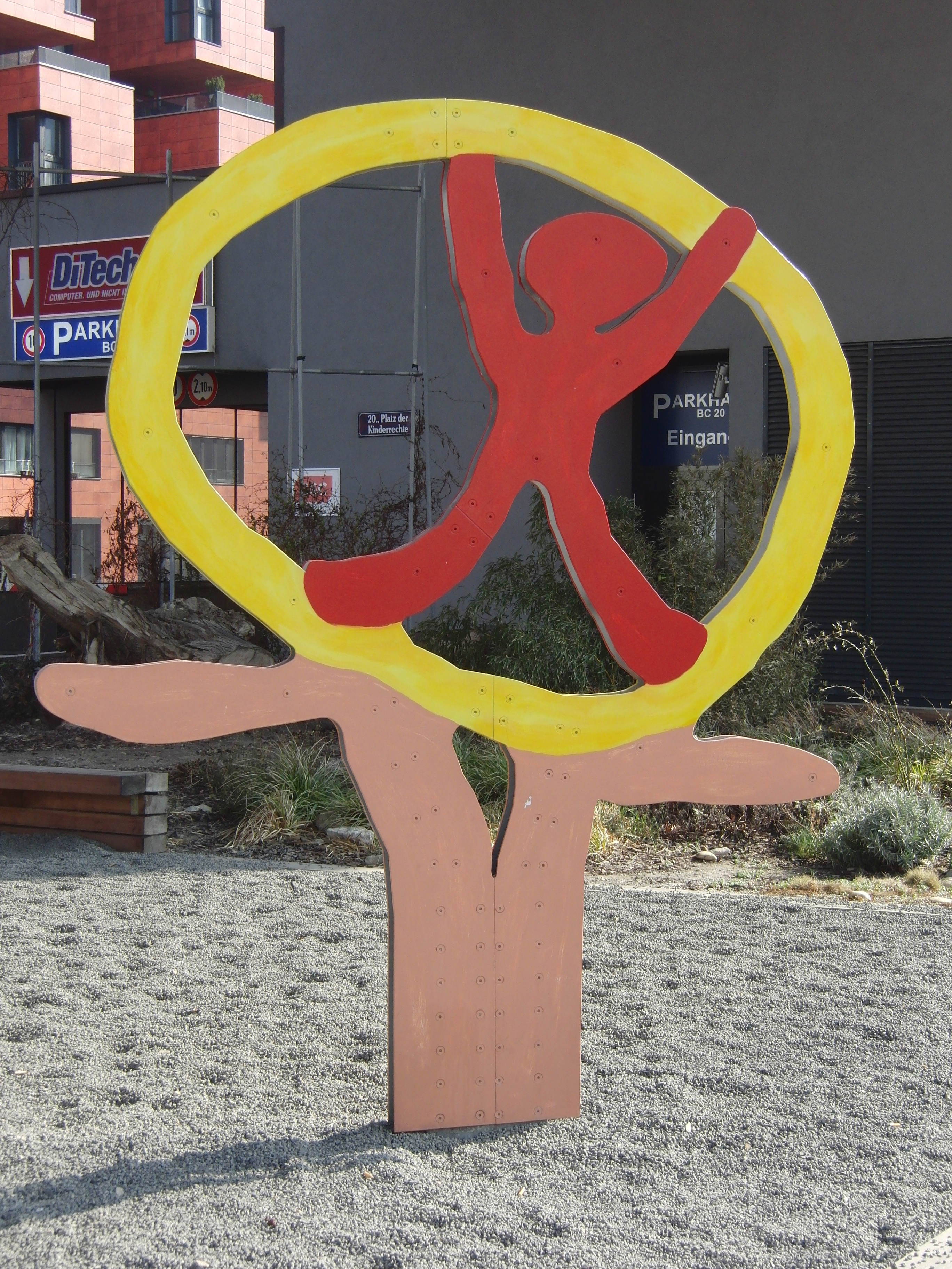 Skulptur am Platz der Kinderrechte in Wien Brigittenau, Österreich.